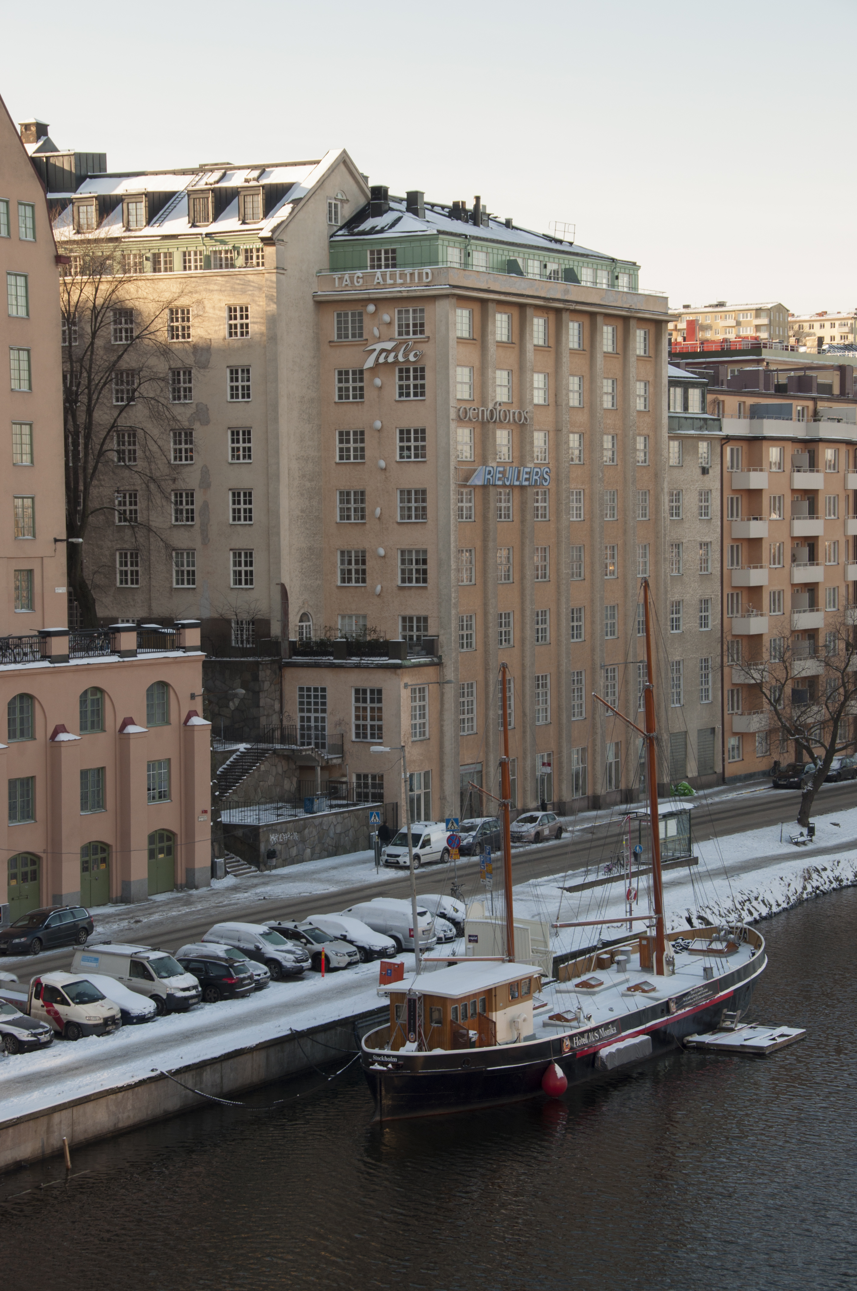 Bojen 14, Kungsholms Strand 135, Byggnadsår 1926-27, arkitekt AB Adlings byggnadsbyrå, byggherre Aktiebolaget Förenade Chokladfabrikerna, byggmästare Axel Adling.